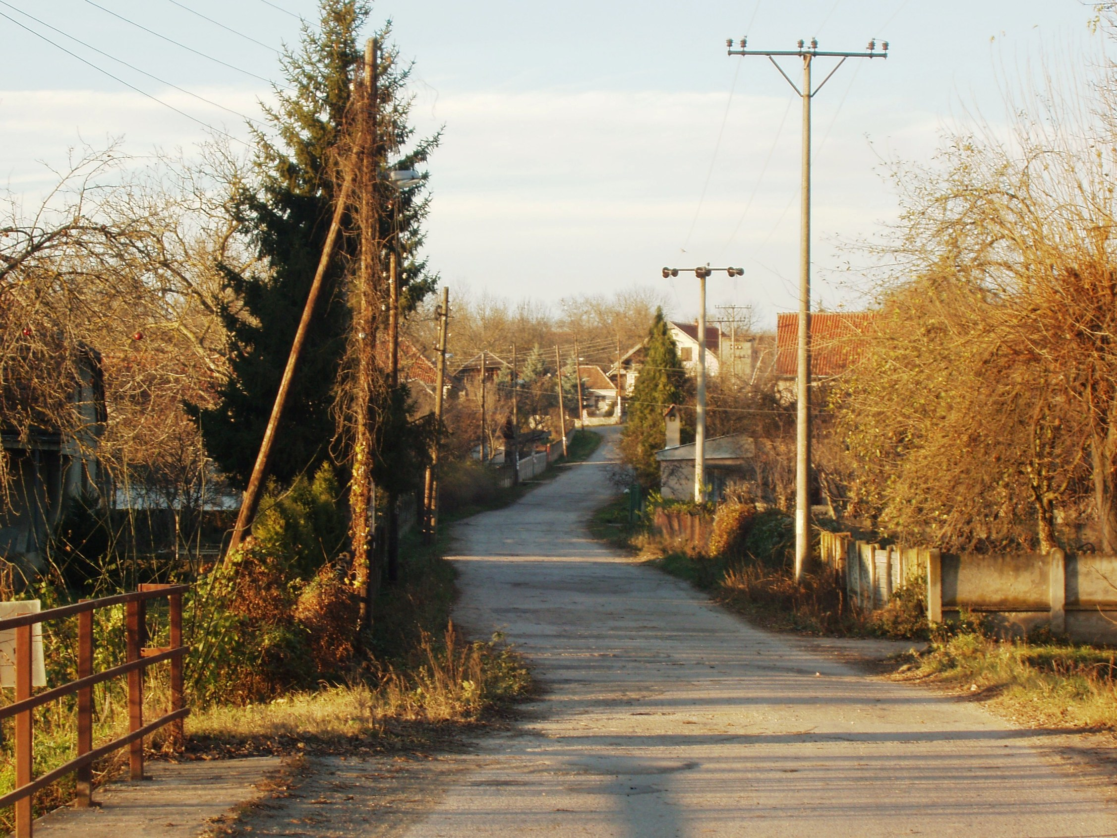 Улица у Претрковцу